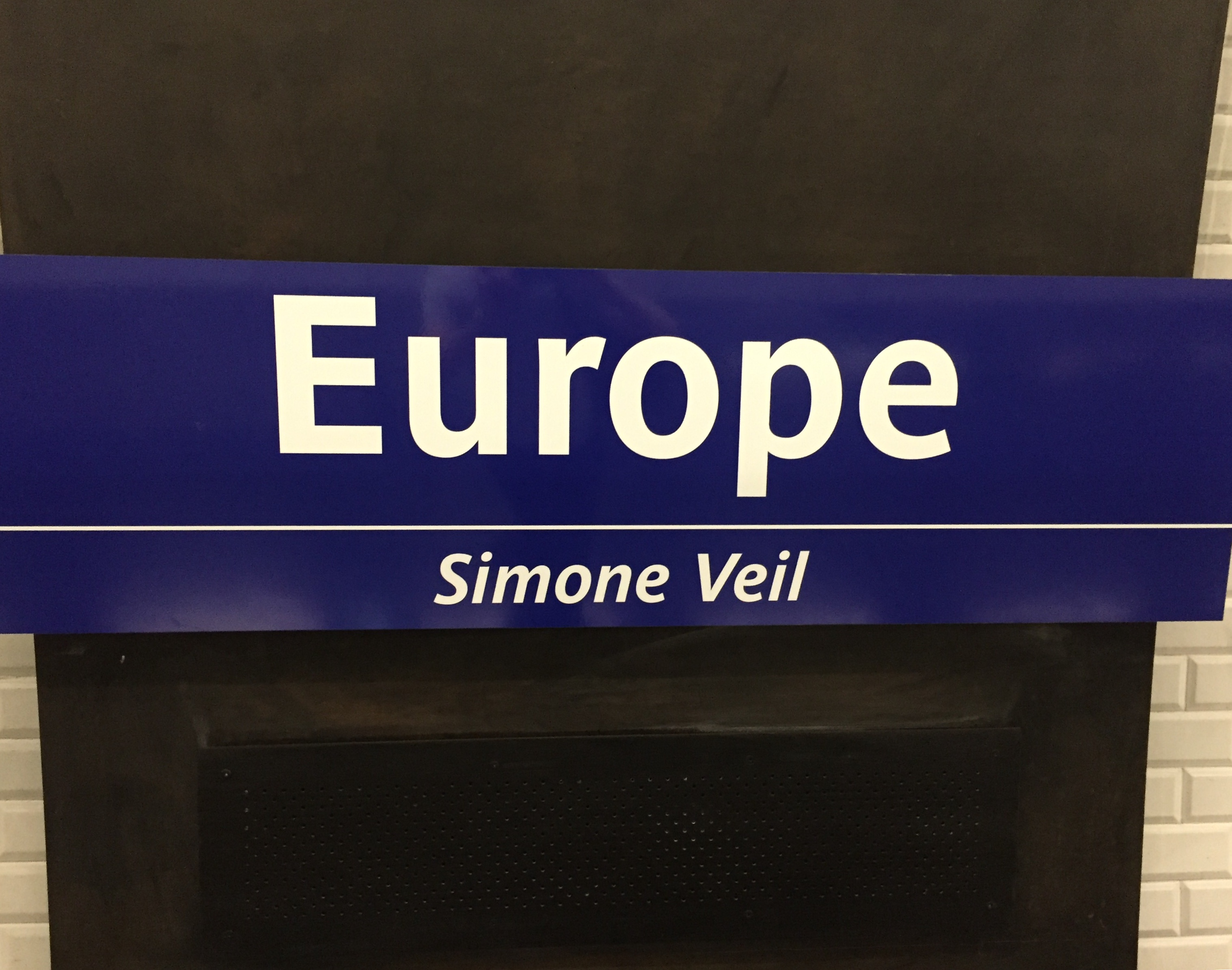 Sur les quais de la station de métro Europe, le sous-titre Simone Veil a été ajouté en 2018.